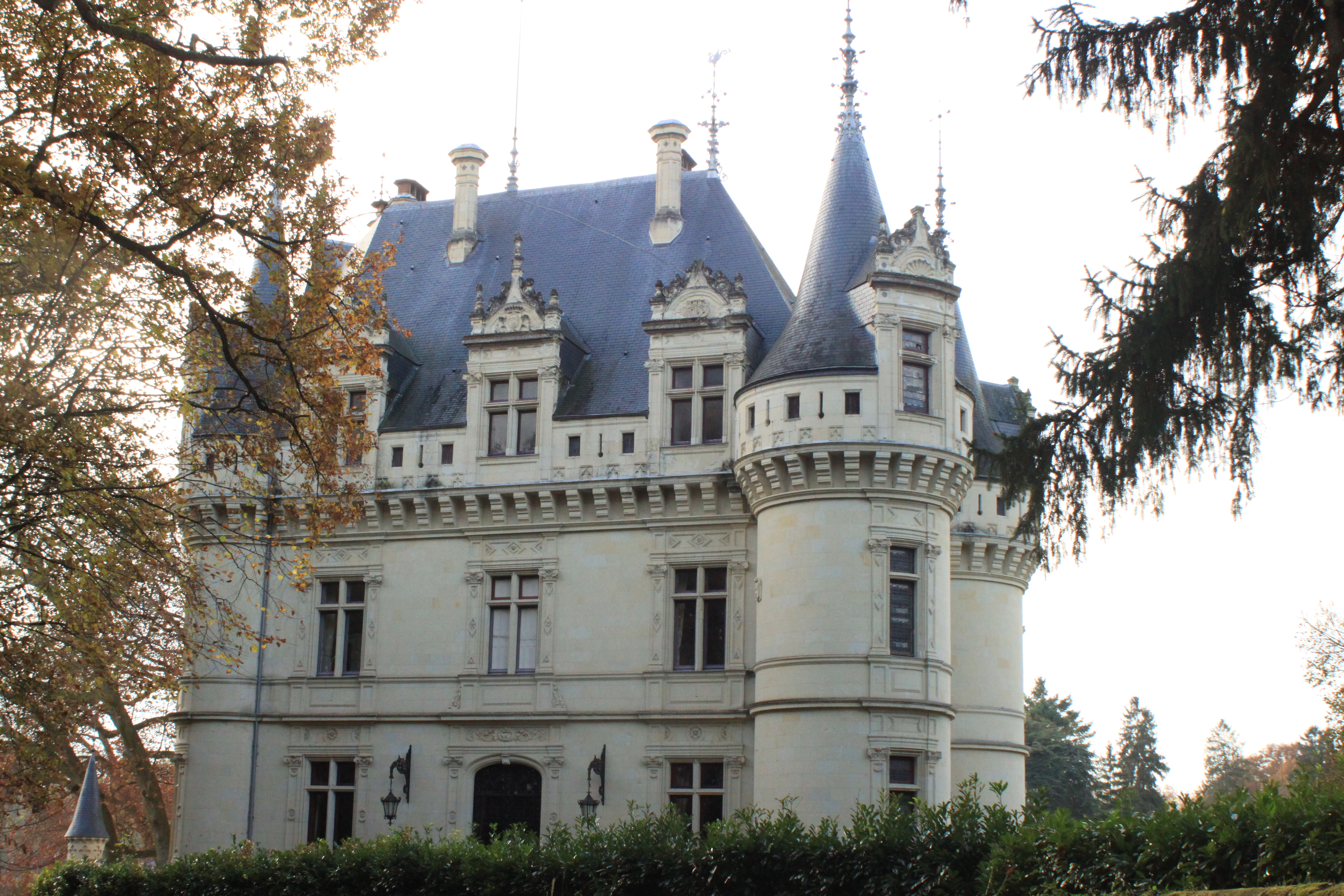 Château de Marson, Fr-49-Rou-Marson.